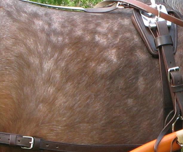 ardennes horse